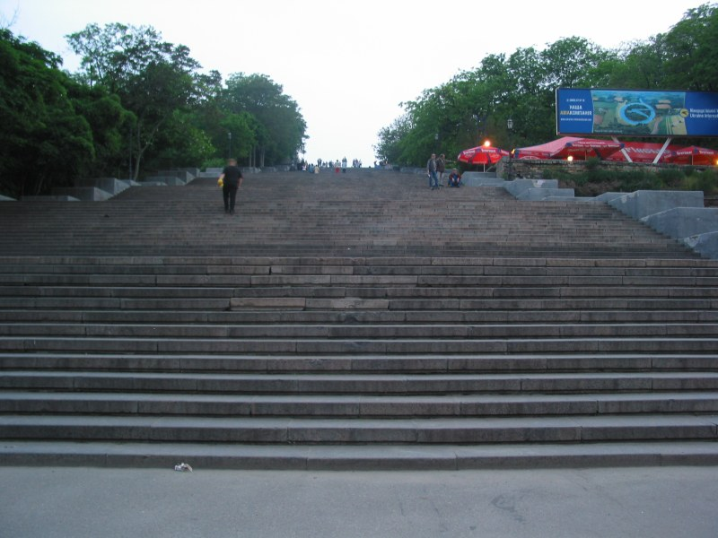 Potemkinsche Treppe in Odessa.